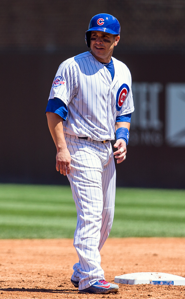 Miguel Montero